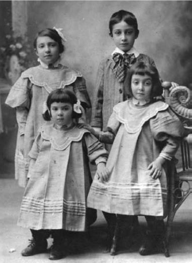 Los primeros armenios mexicanos: Luz, Víctor Manuel, Guadalupe y María Teresa (circa 1911)